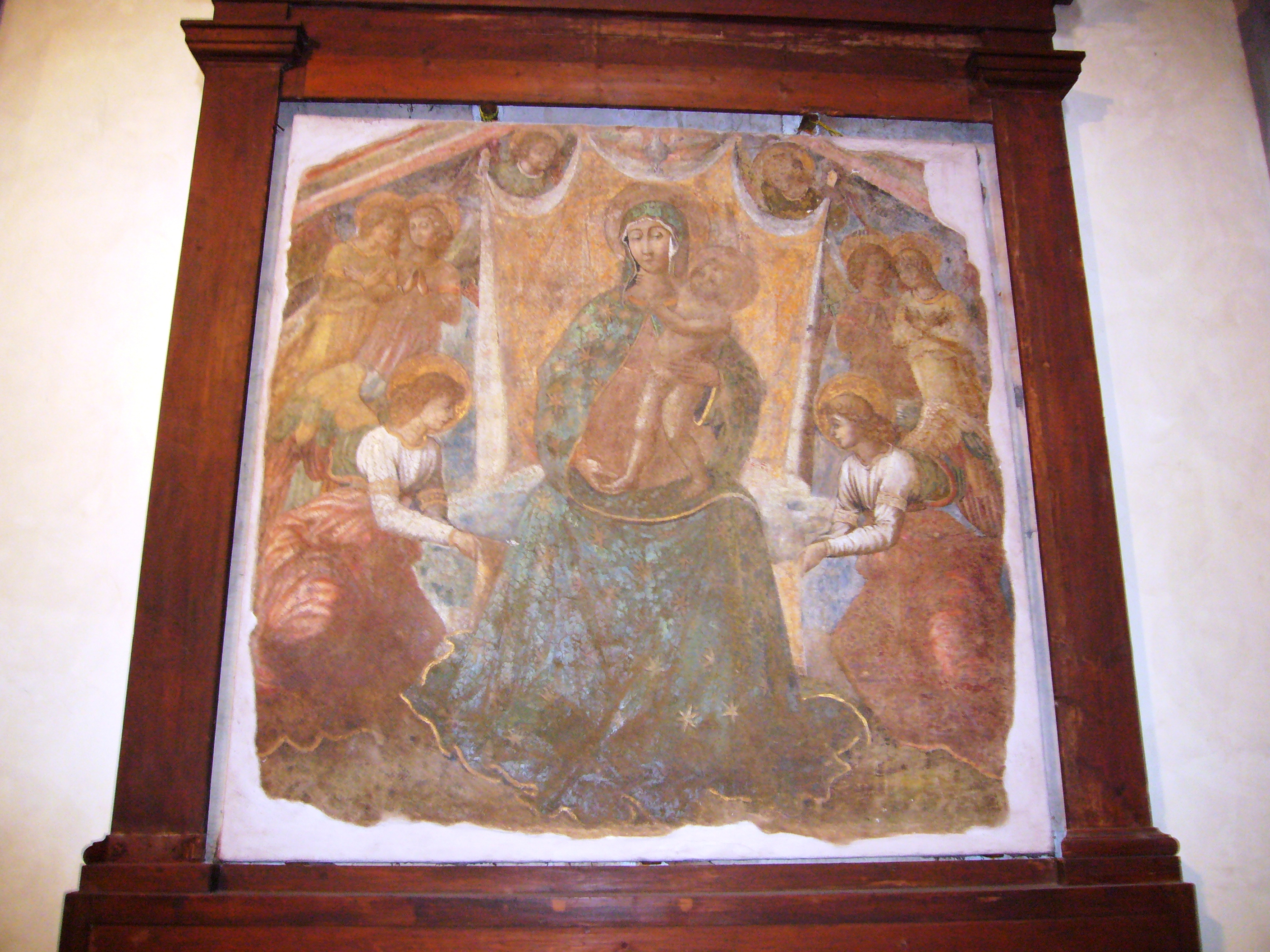 Roma, Sant'Angelo in Pescheria: Benozzo Gozzoli, Madonna col Bambino e angeli